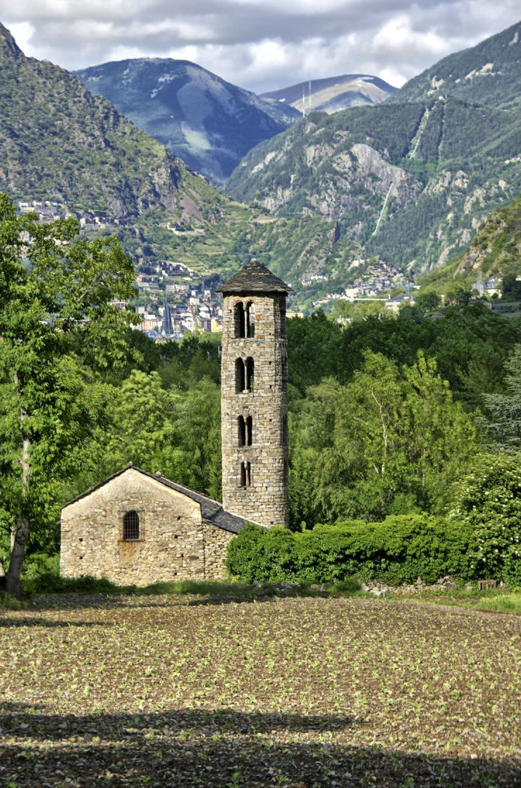 Església de Santa Coloma